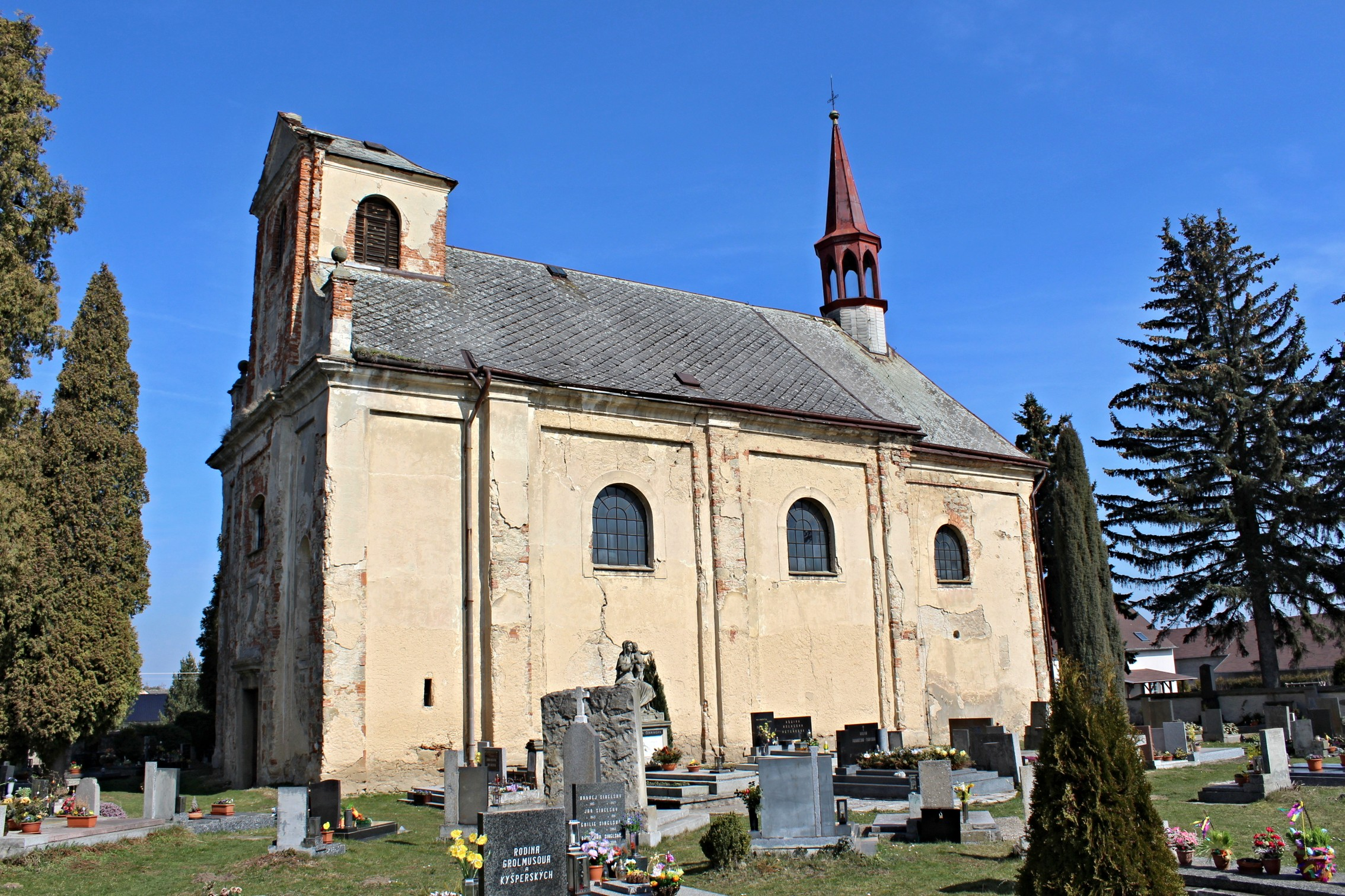 Čistá, kostel sv. Vavřince